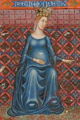 Marie Uherská